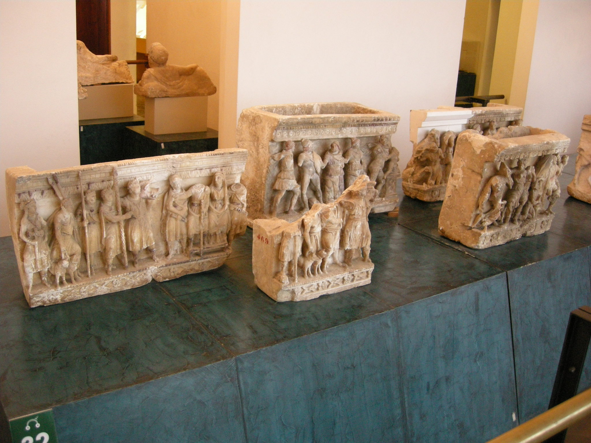 Museo guarnacci, urnetta, terza serie